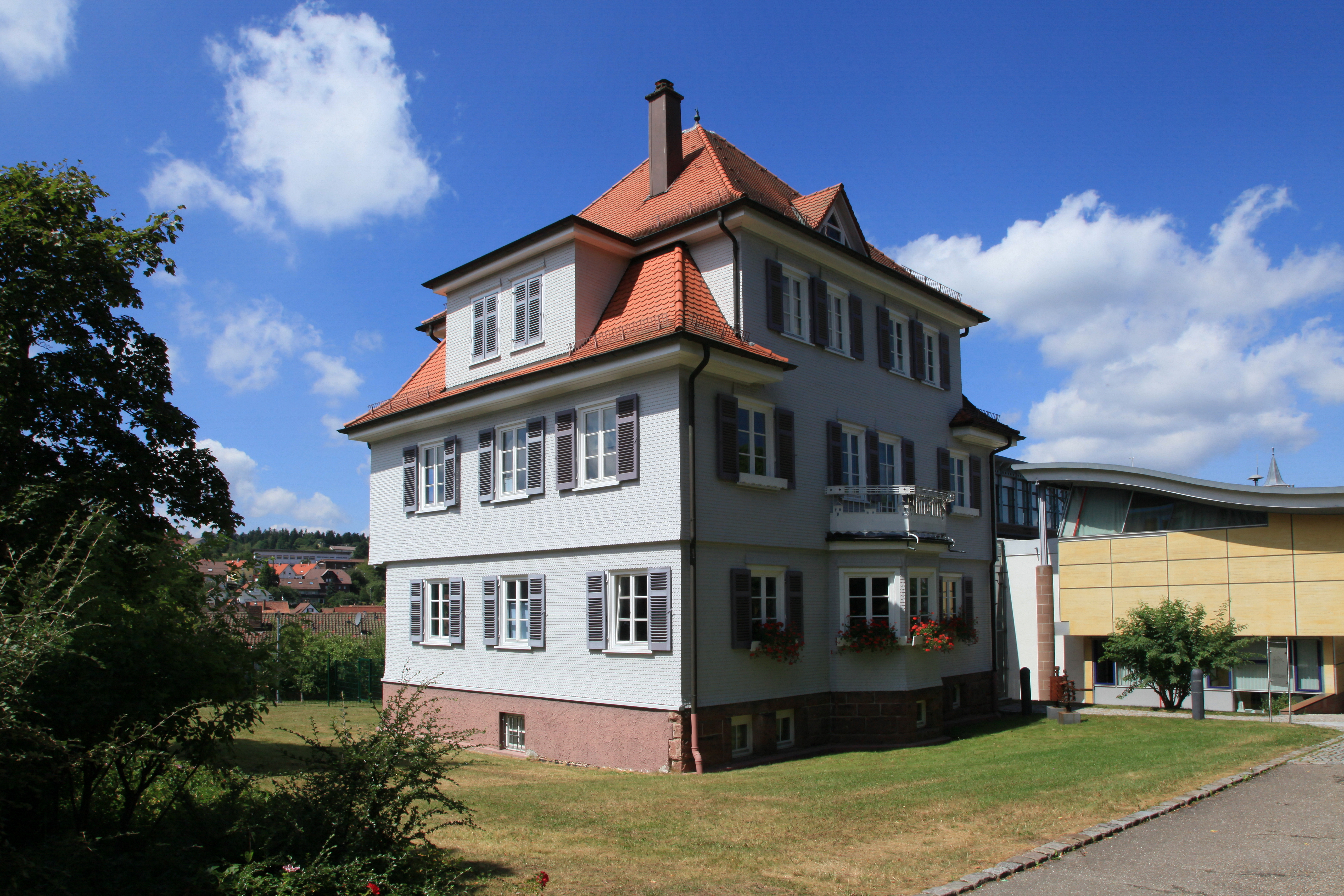 Haus Bühler, Parkstraße 6, vor dem Rathaus in Schömberg (Landkreis Calw)